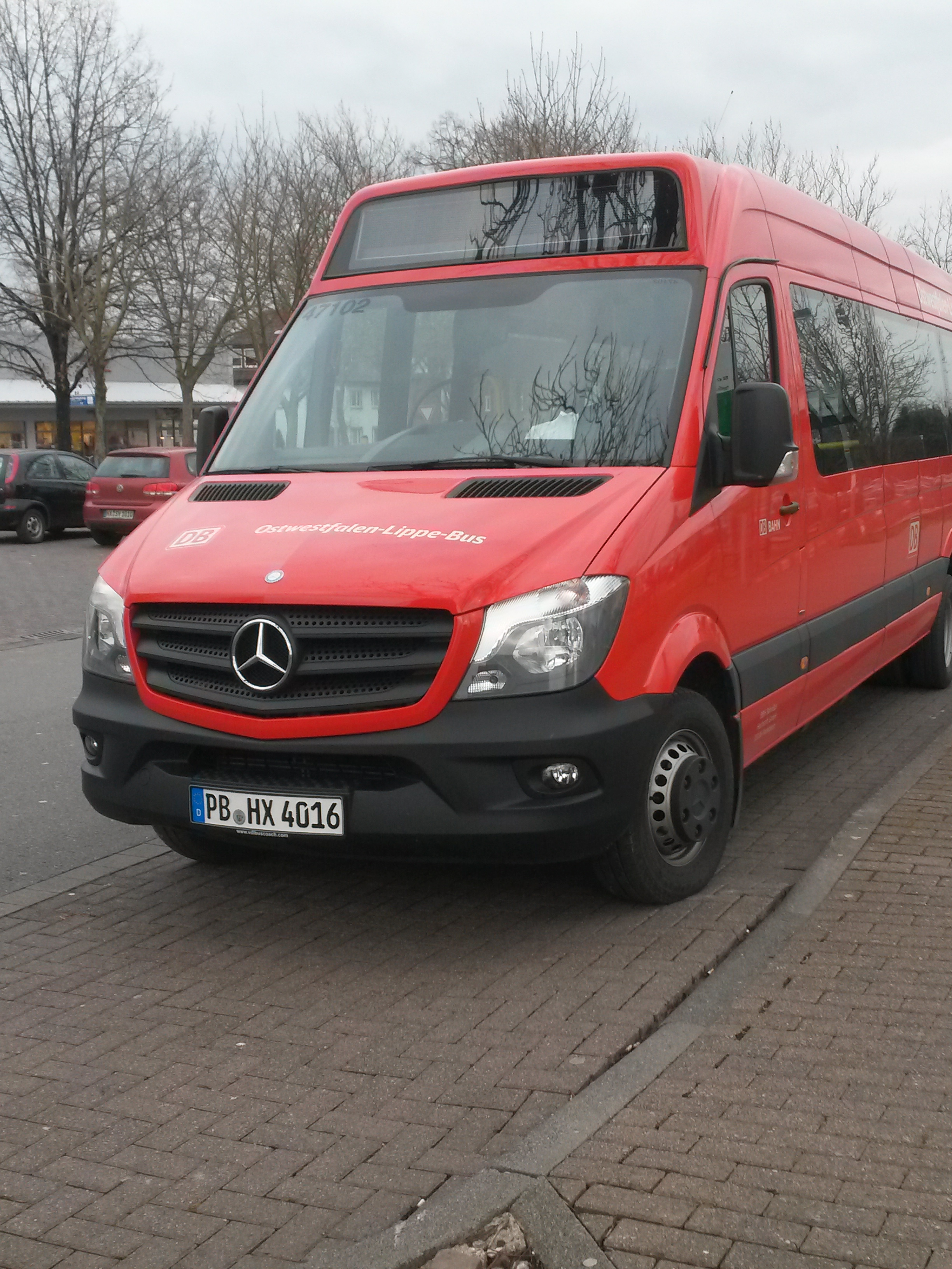 Die "neuen" Mercedes Sprinter sind da... (in Warburg am Schützenplatz)